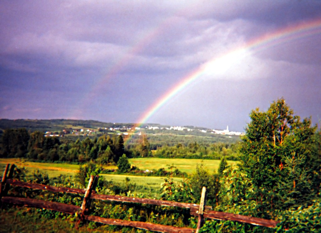 Saint-Louis-du-Ha! Ha! municipalité de paroisse dans la municipalité régionale de comté (MRC) du Témiscouata au Québec, située dans la région administrative du Bas-Saint-Laurent.